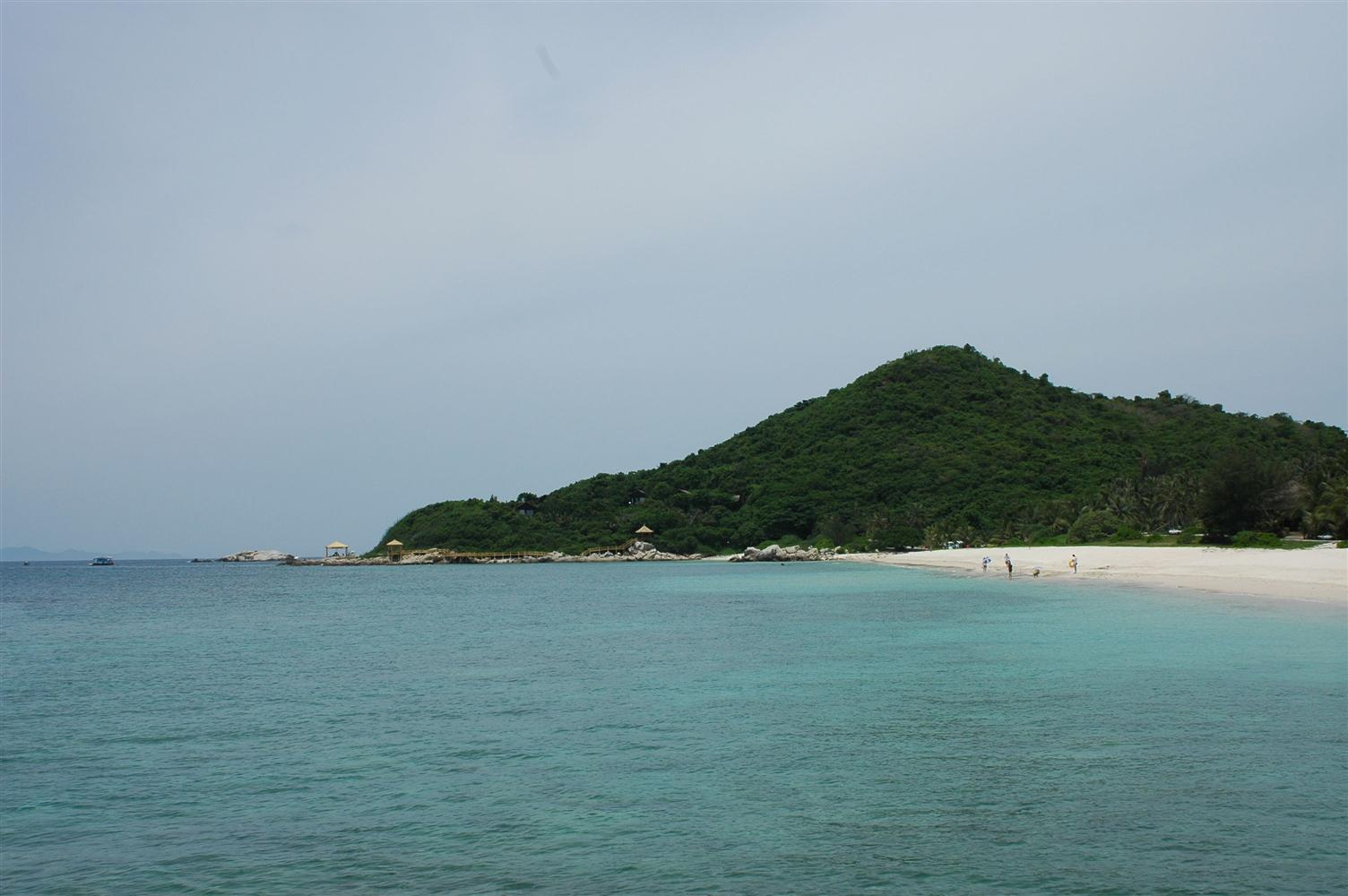 海南三亚蜈支洲岛